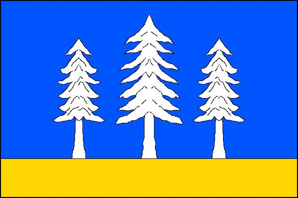 Vlajka obce Krásná (okres Frýdek-Místek)